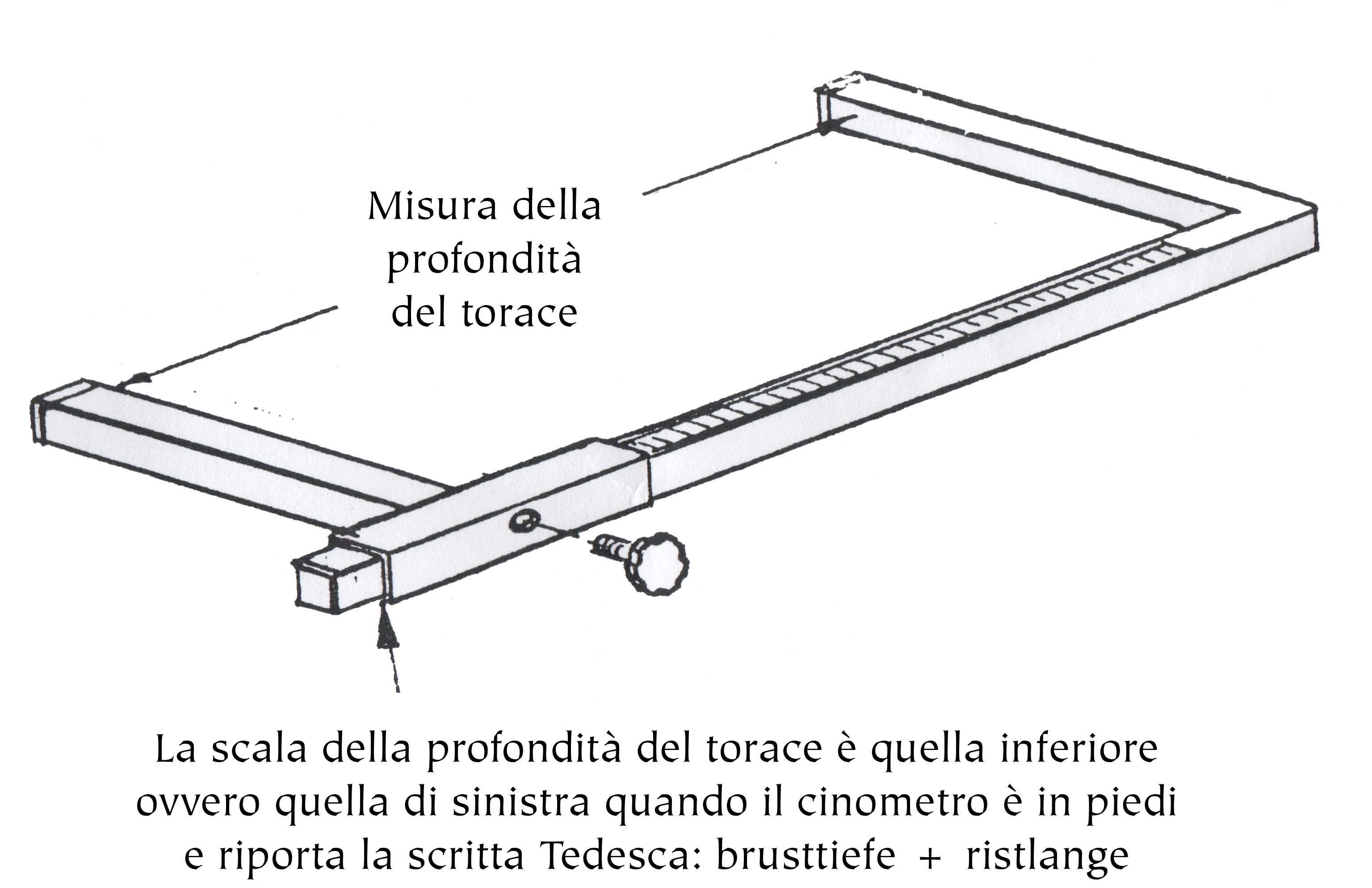 Disegno raffigurante la traduzione in italiano delle etichette poste sui cinometri professionali tedeschi